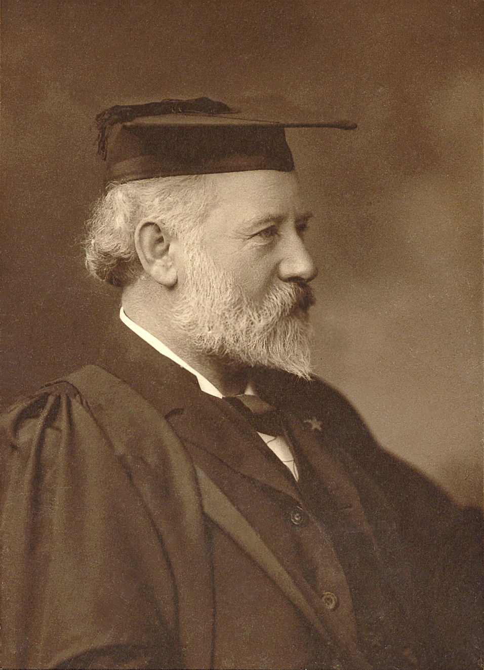 George Cunningham, brita esperantisto.